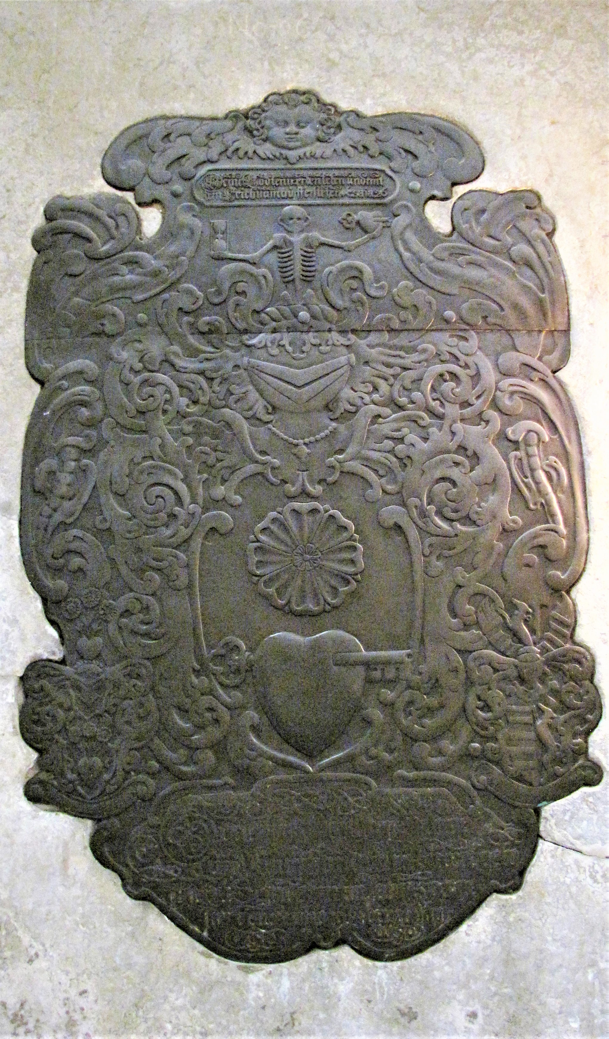 Grabstein des am 26. Mai 1654 gestorbenen Kaufmanns Heinrich Schlüter, Marienkirche Lübeck, Westwand des südlichen Querschiffes